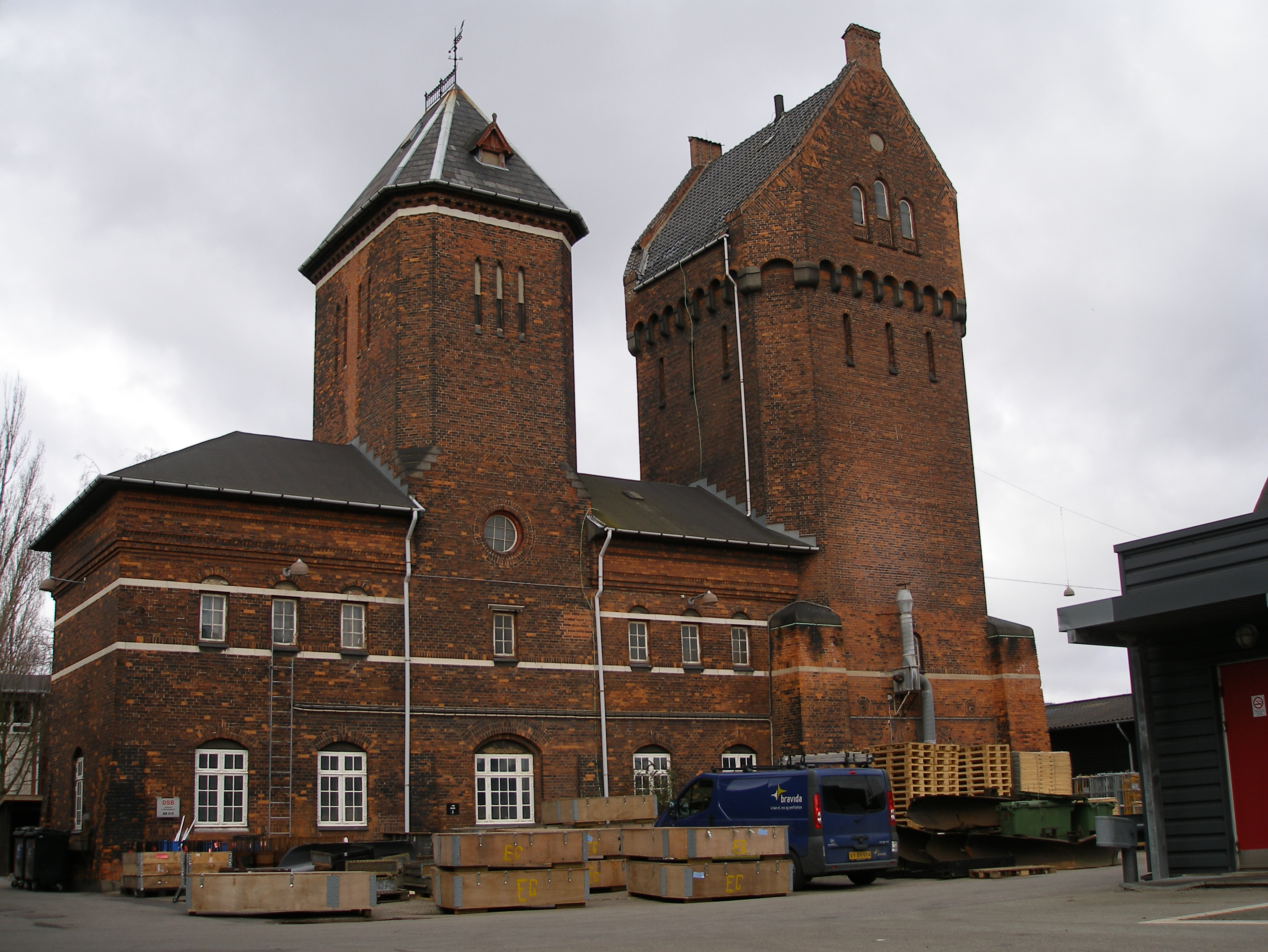 Tidligere DSB-vandtårn på Otto Busses Vej, København